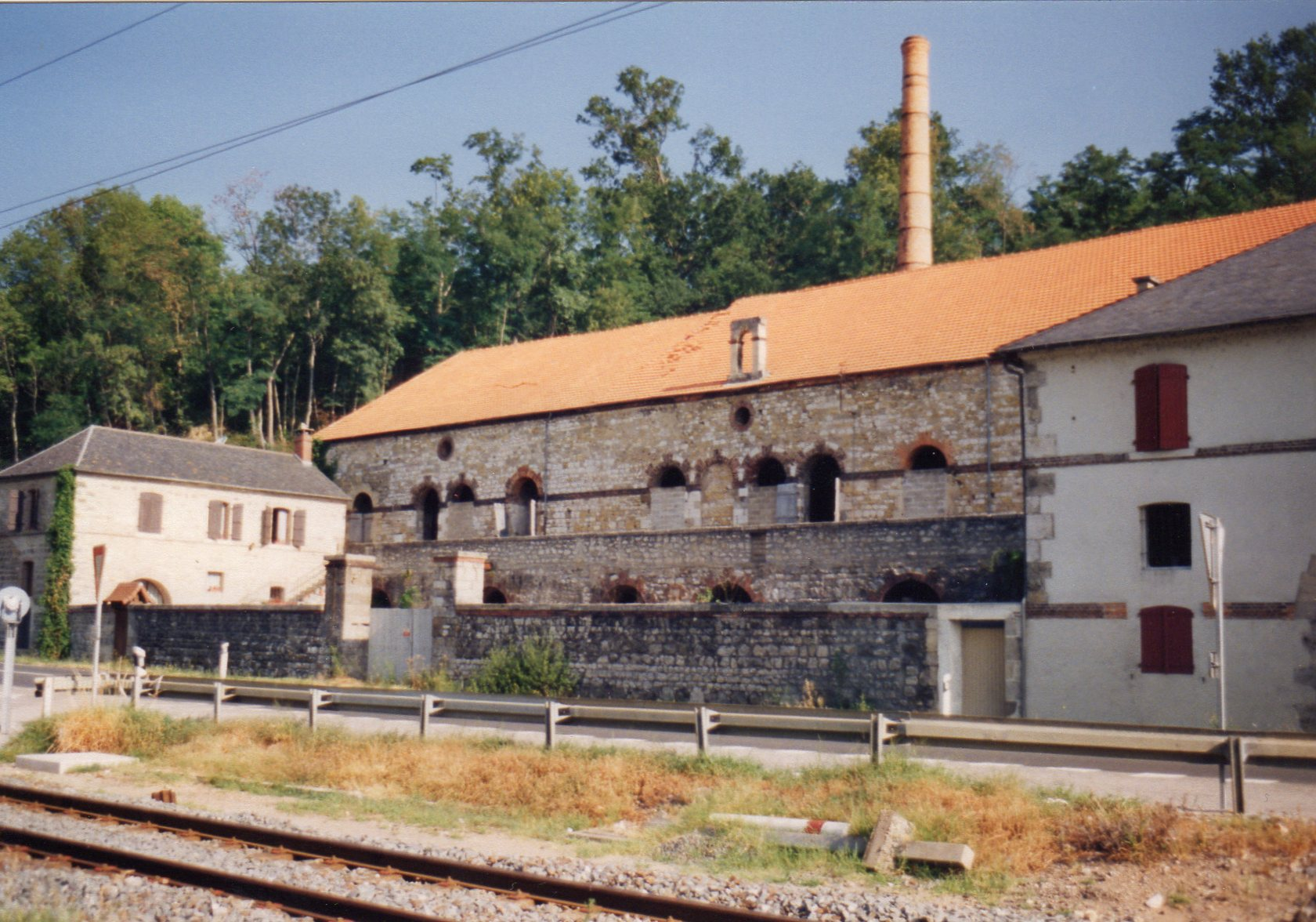 Le Lardin- St Lazare : hameau de Brardville, la verrerie construite par l'ingénieur Brard vers 1817, vue depuis la route